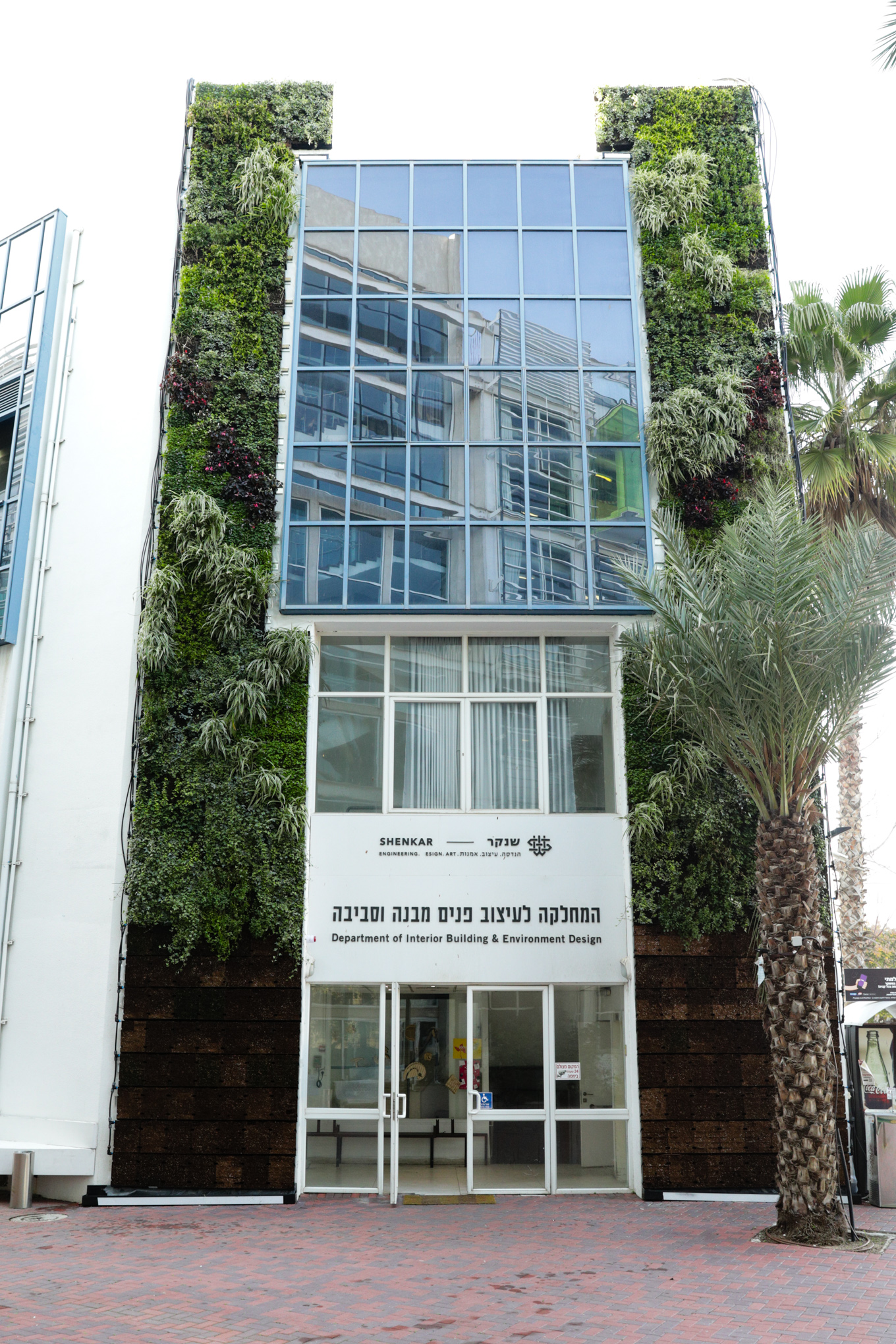 המחלקה לעיצוב פנים מבנה וסביבה, שנקר